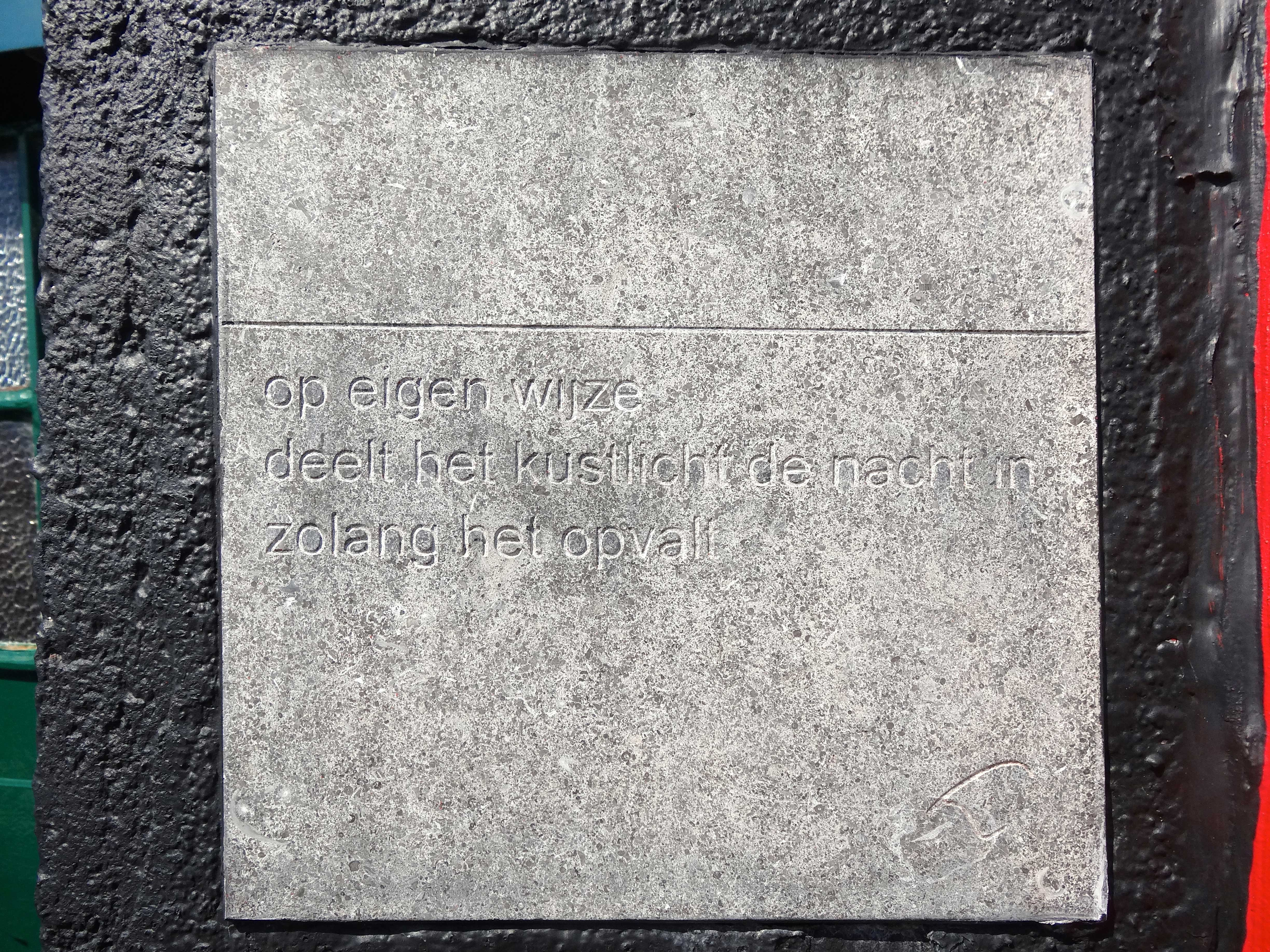 Haiku door Jan Loman, reliëf aangebracht op de vuurtoren van Schiermonnikoog